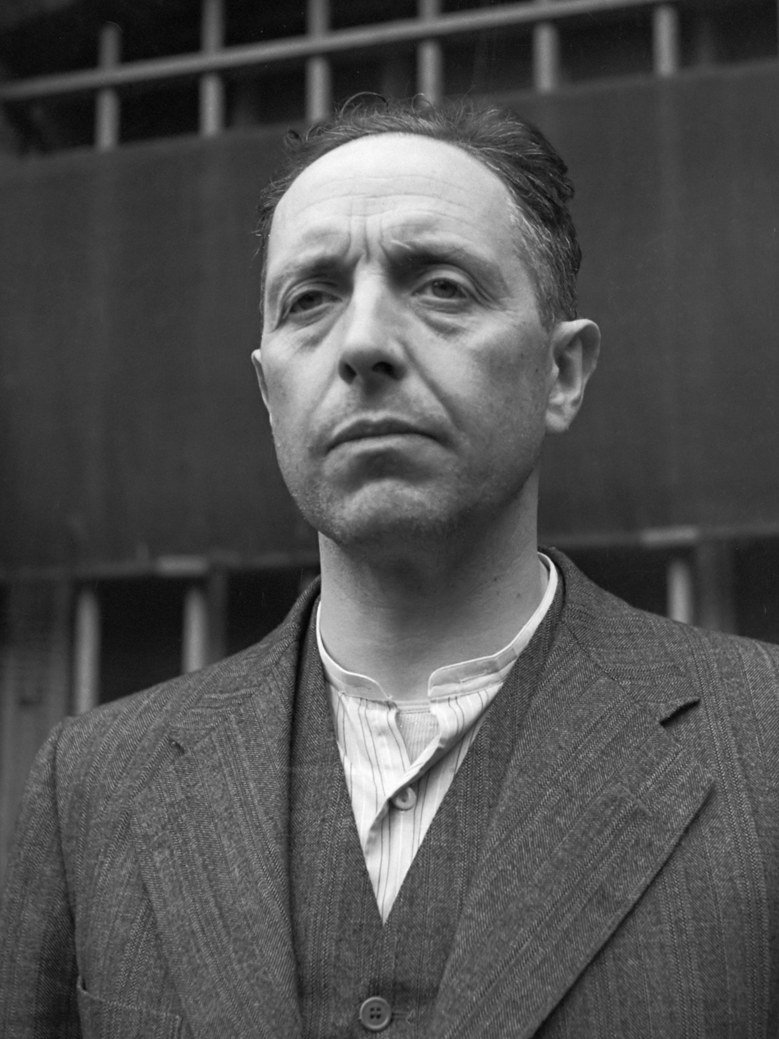 Oorlogsmisdadigers. C.J. Huygen 1945